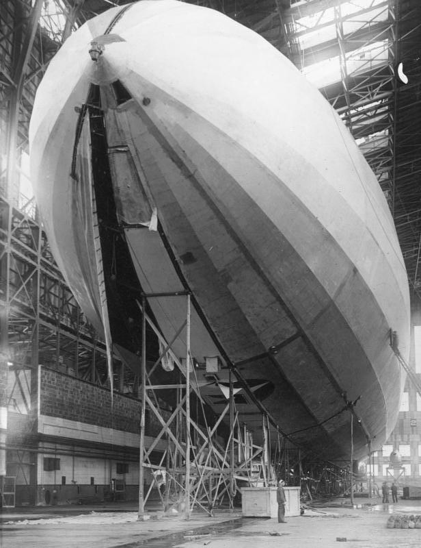 Die "Los Angeles", das frühere Zeppelin-Luftschiff "Z.R.III" wird vor einem grösseren Fluge renoviert! Die Renovierungsarbeiten an dem früheren deutschen Luftschiff "Los Angeles" in der Halle in Lakehurst.